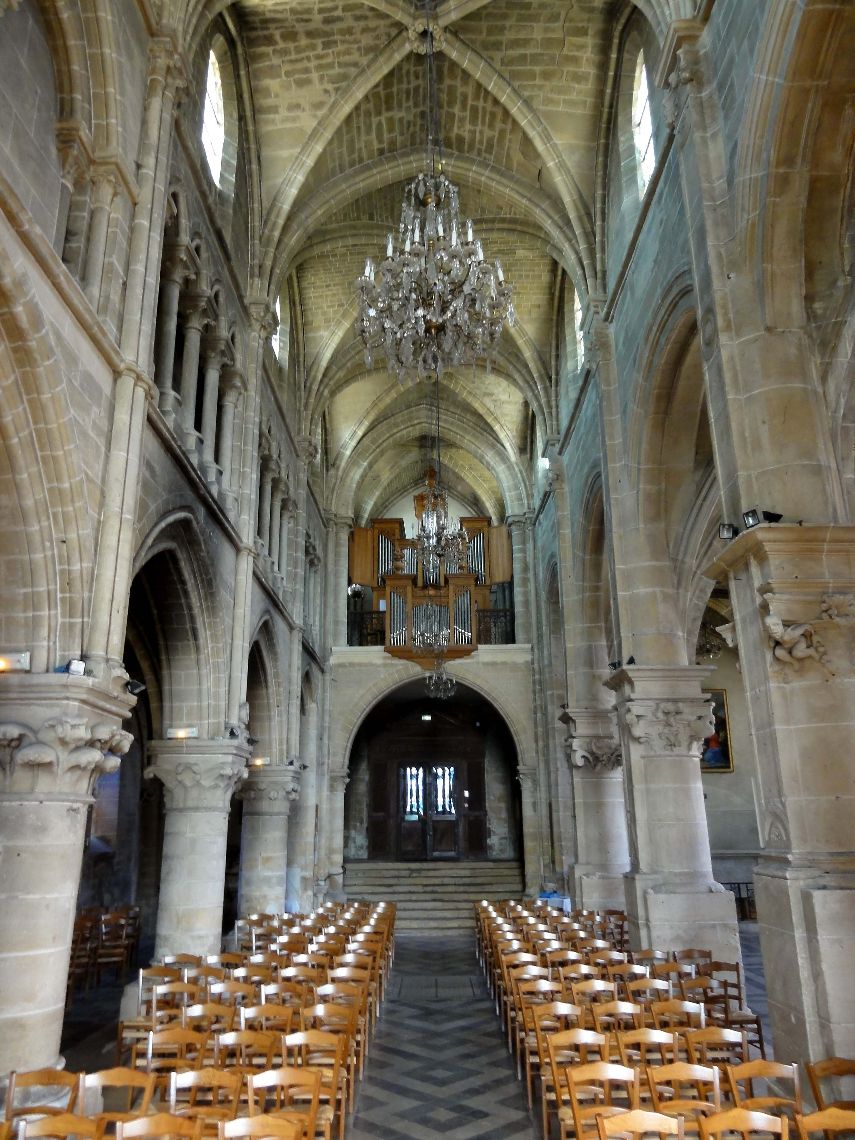 Intérieur de l'église - voir titre.